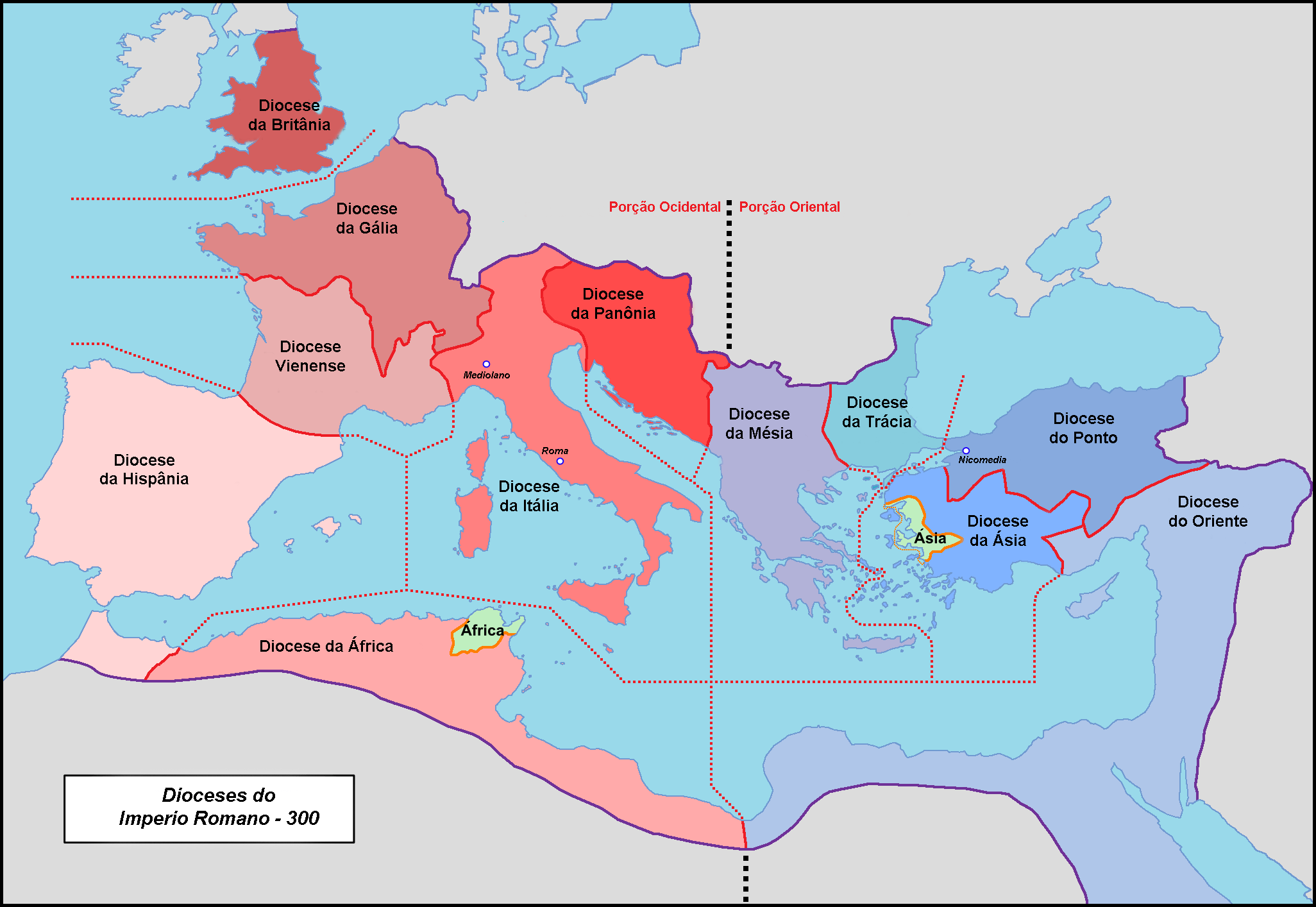 Mapa das dioceses romanas em 300